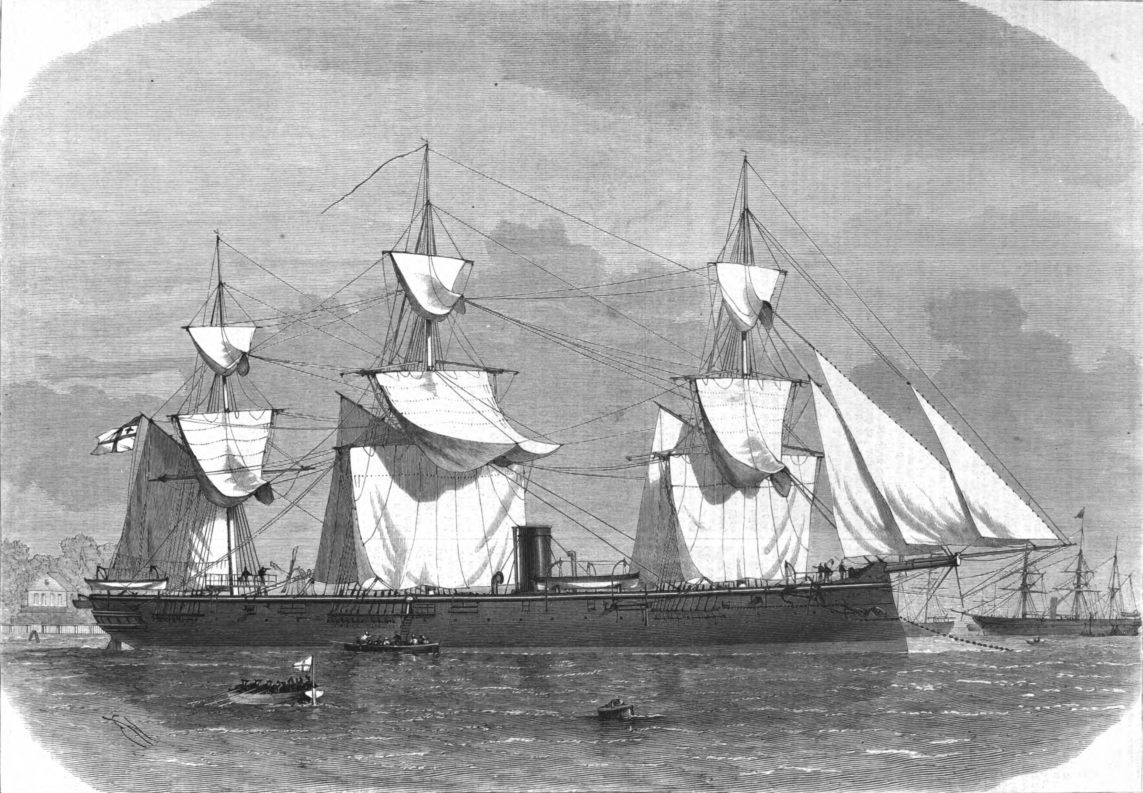 Korvette SMS Ariadne, 1871.